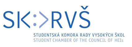 hlavní logo Studentské komory Rady vysokých škol